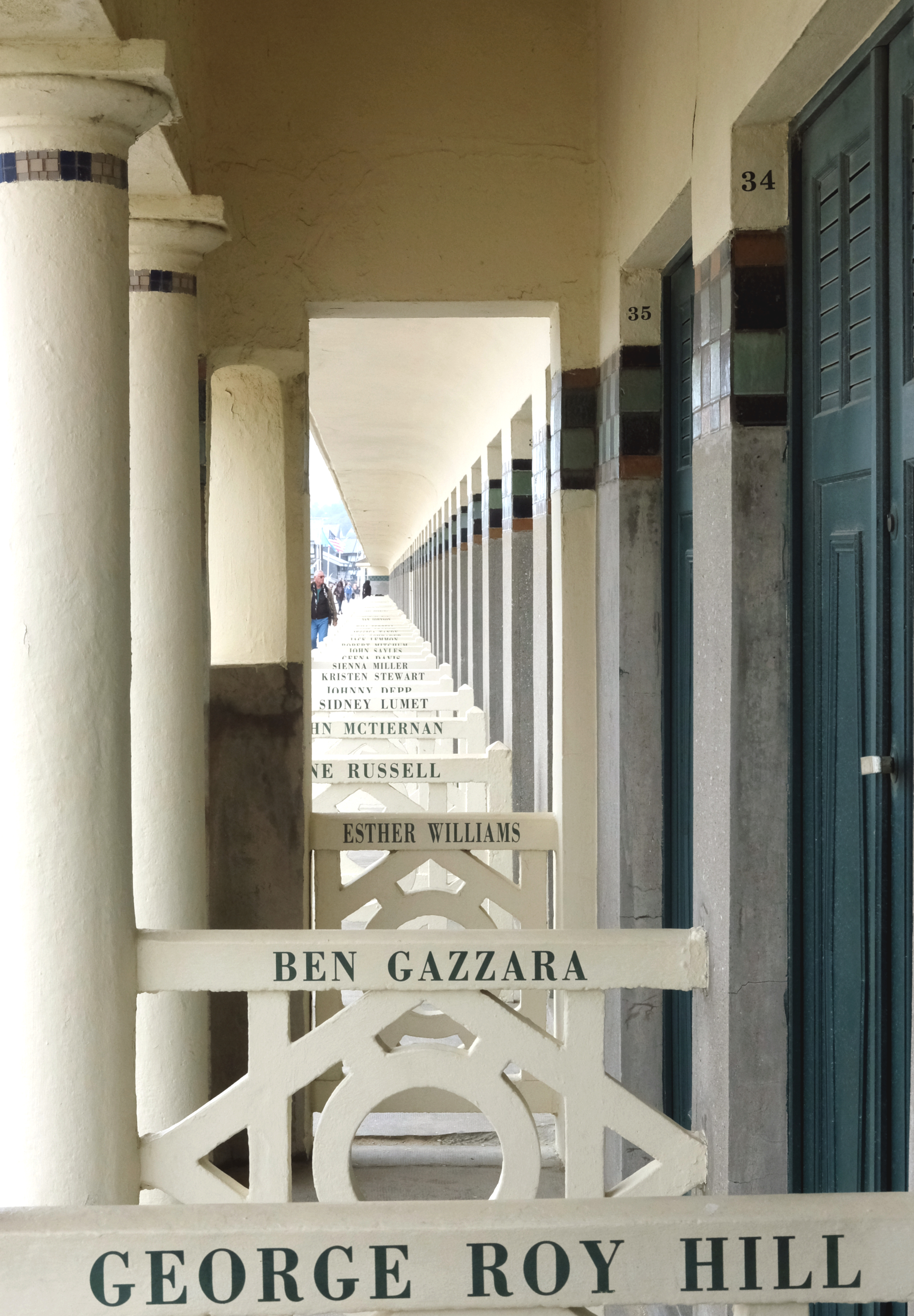 Deauville - La promenade et ses cabines